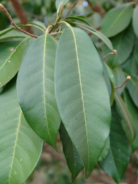 Leaves of Esenbeckia leiocarpa Engl. - RUTACEAE - Bosque do IBAMA - Brasília - Distrito Federal - Brasil.